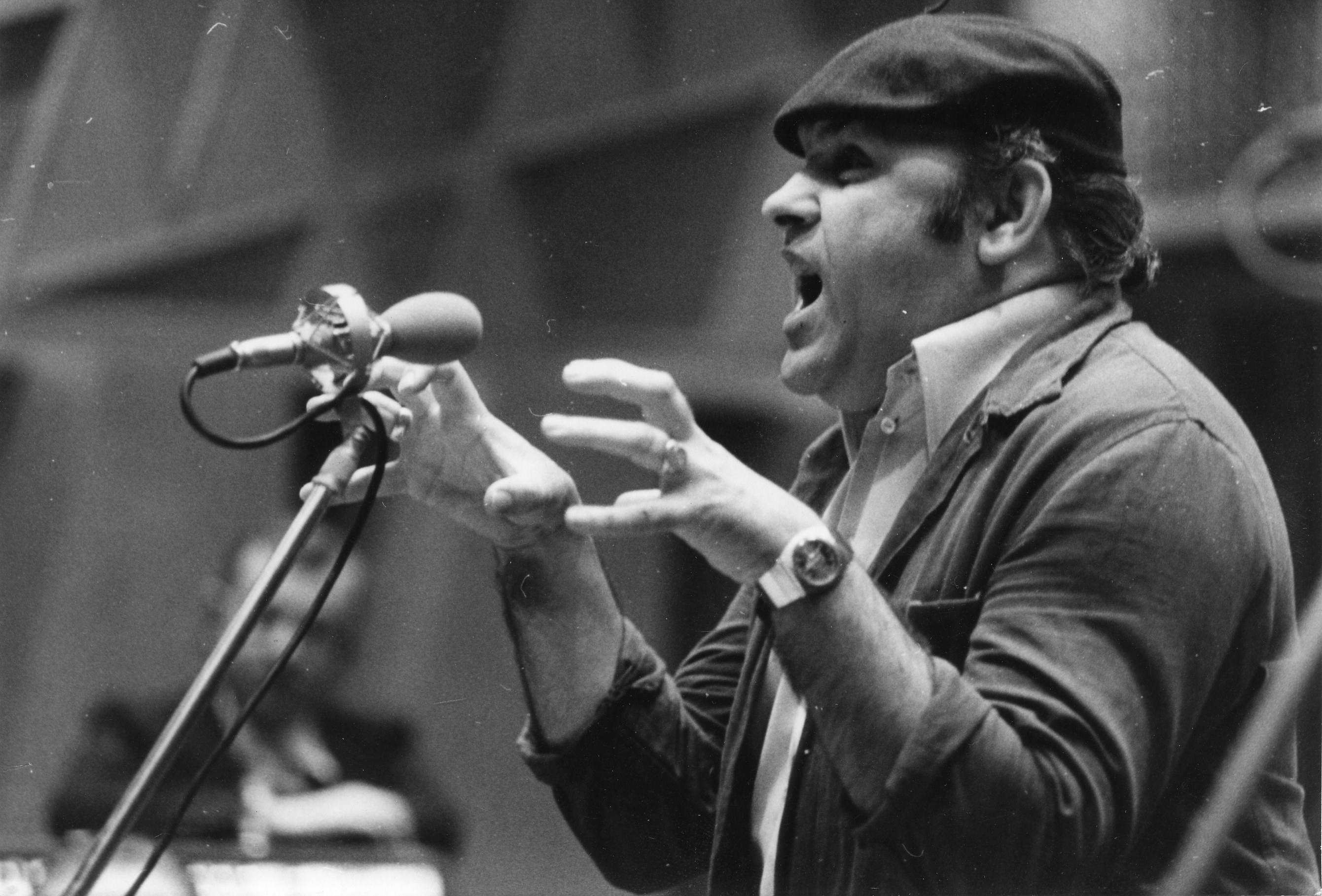 a Magyar Rádió stúdiójában Hofi Géza humorista. Location: Hungary, Budapest VIII. Tags: Hungarian Radio, Budapest Title: a Magyar Rádió stúdiójában Hofi Géza humorista.